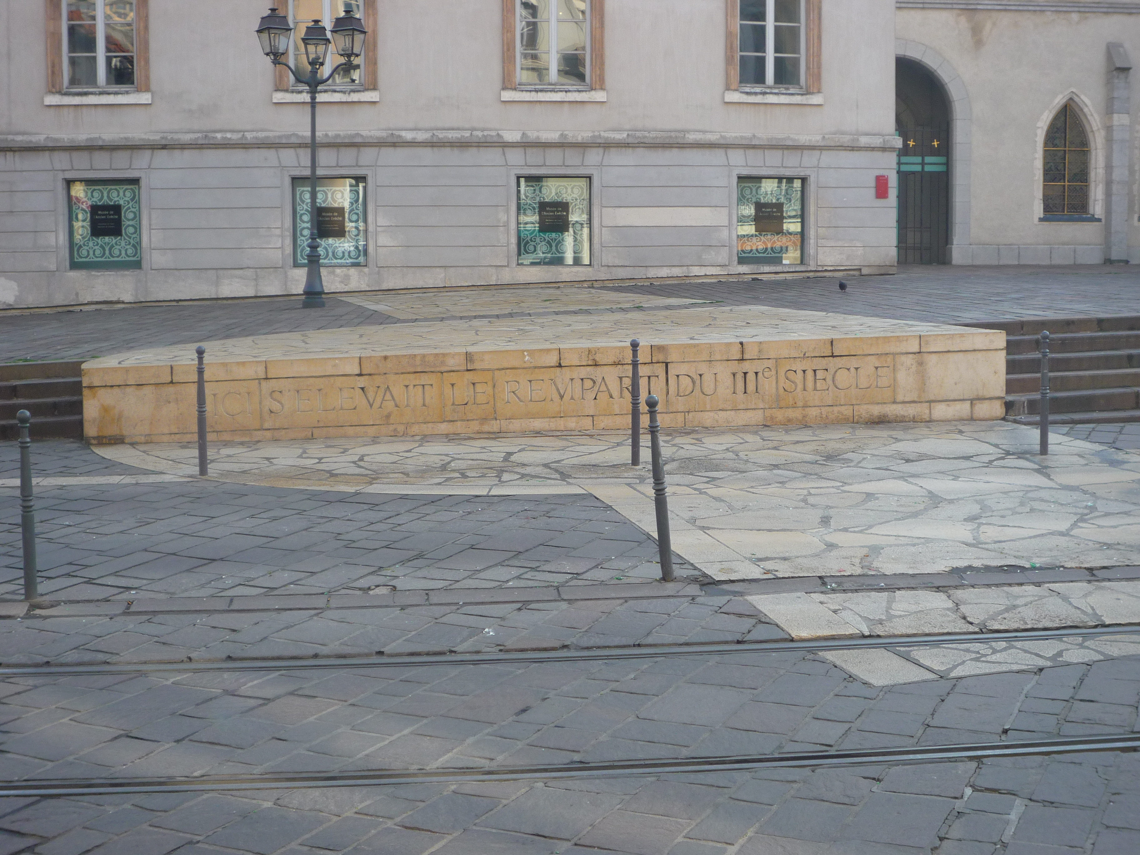 Emplacement représenté de la porte Viennoise construite à la fin du IIIe siècle, l'une des deux portes de l'enceinte romaine de Grenoble. Actuellement place Notre-Dame à Grenoble.